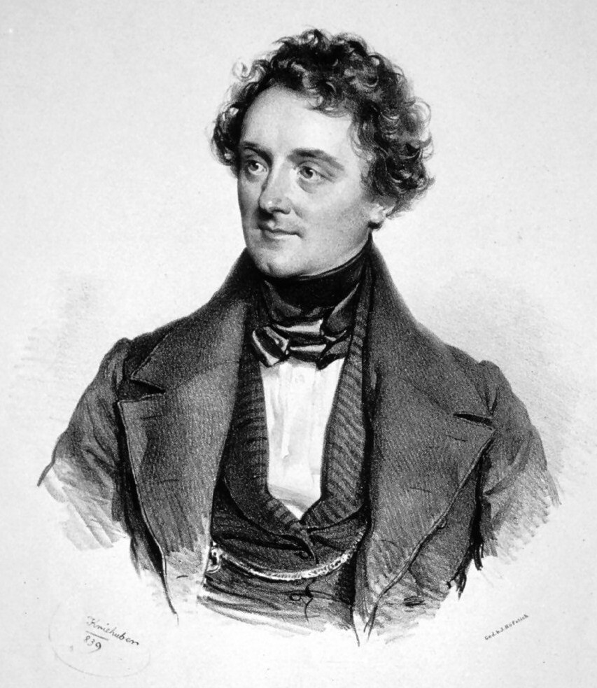 Johann Nestroy, Lithographie von Josef Kriehuber, 1839